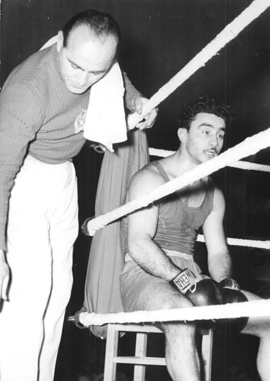 Laslo Papp Zentralbild Bez.Red.Erf. 13.12.1955 Boxländerkampf Ungarn- DDR 16:4. Am Sonntag, dem 11. Dezember 1955 fand in der Thüringenhalle in Erfurt ein Boxländerkampf Ungarn- DDR statt. Die DDR Vertretung unterlag mit 16:4 Punkten den ungarischen Gästen. UBz:Der zweifache Olympiasieger und verdiente Meister des Sports Laslo Papp.